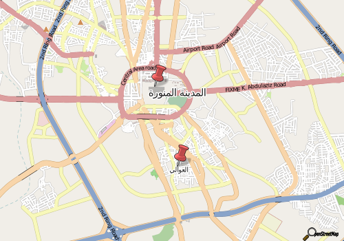 موقع حي العوالي This map may be incomplete, and may contain errors. Don't rely solely on it for navigation.